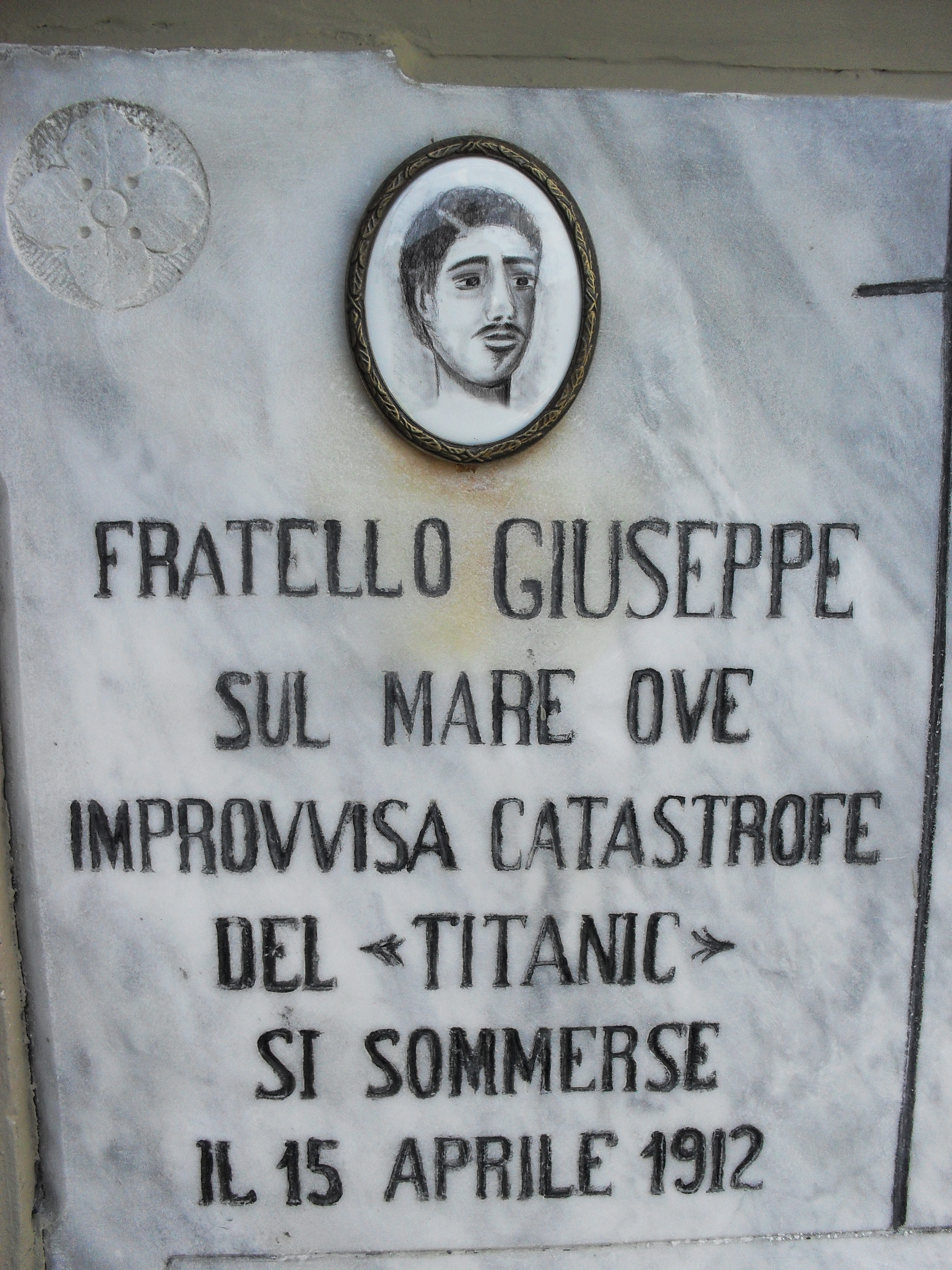 Lapide vittima Titanic